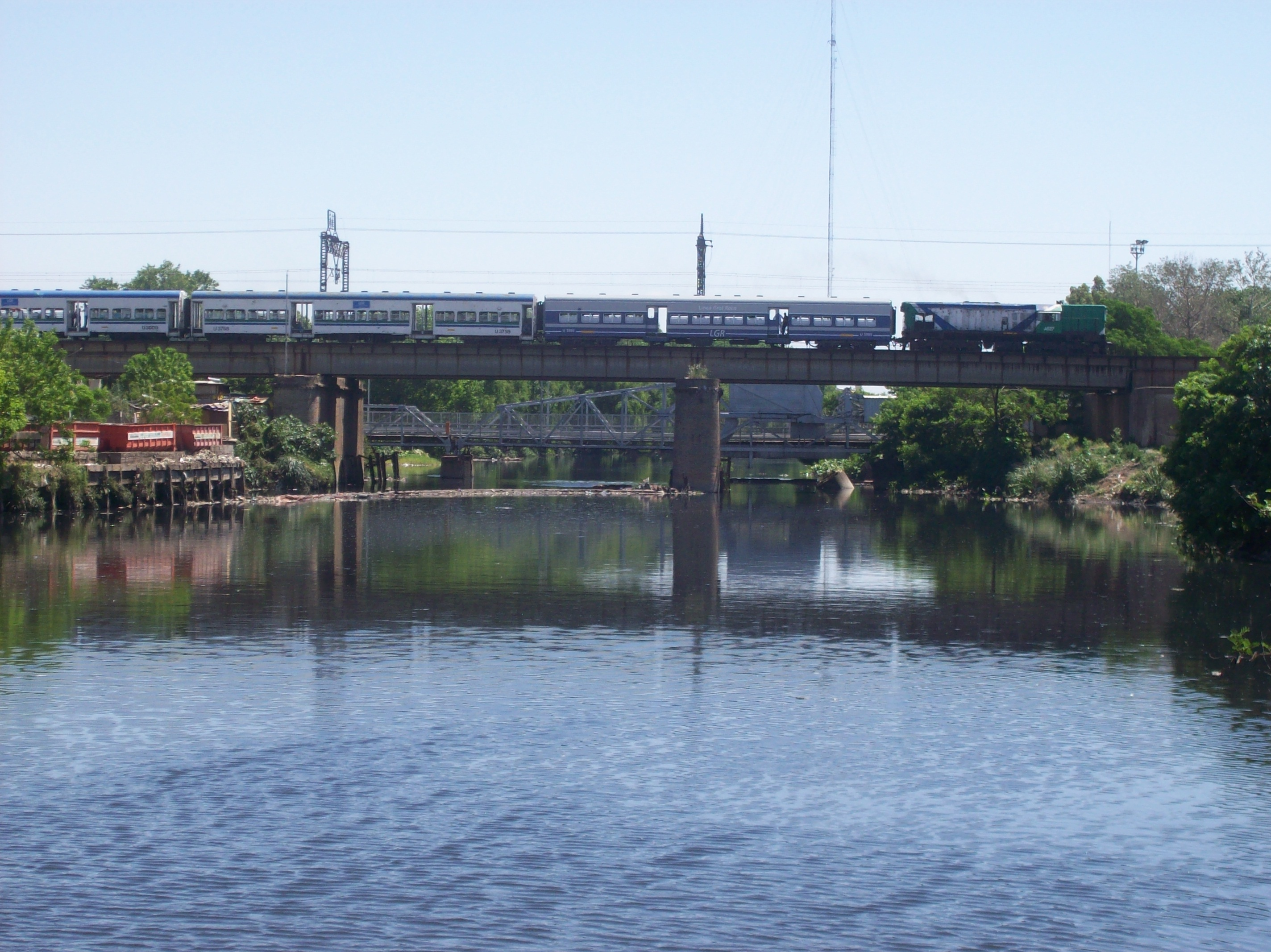 Puente del Ferrocarril Roca y Puente Bosch sobre el Riachuelo. Estos puentes unen el barrio porteño de Barracas y la ciudad de Avellaneda. El tren diesel está ingresando a la Ciudad de Buenos Aires.